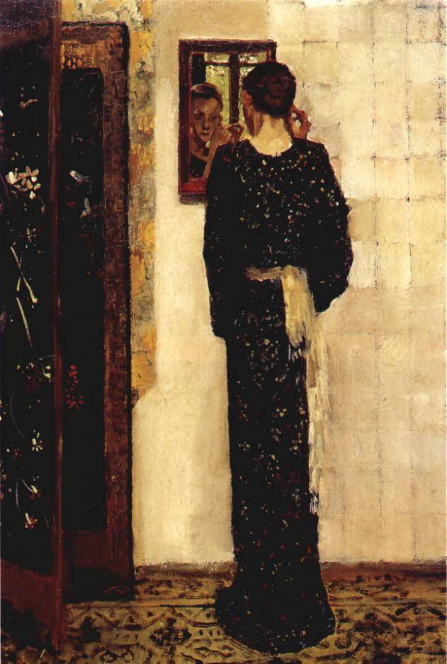 Breitner: Der Ohrring, ca. 1893, Rotterdam